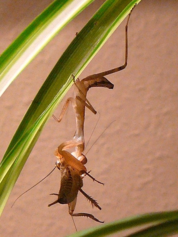 Larvale Sphodromantis lineola mit Acheta domesticus